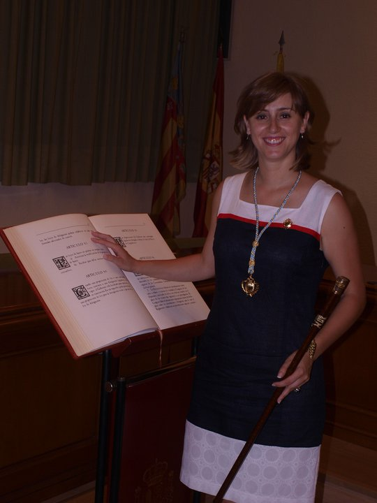 Toma de posesión de Laura como Alcaldesa de Benetússer.